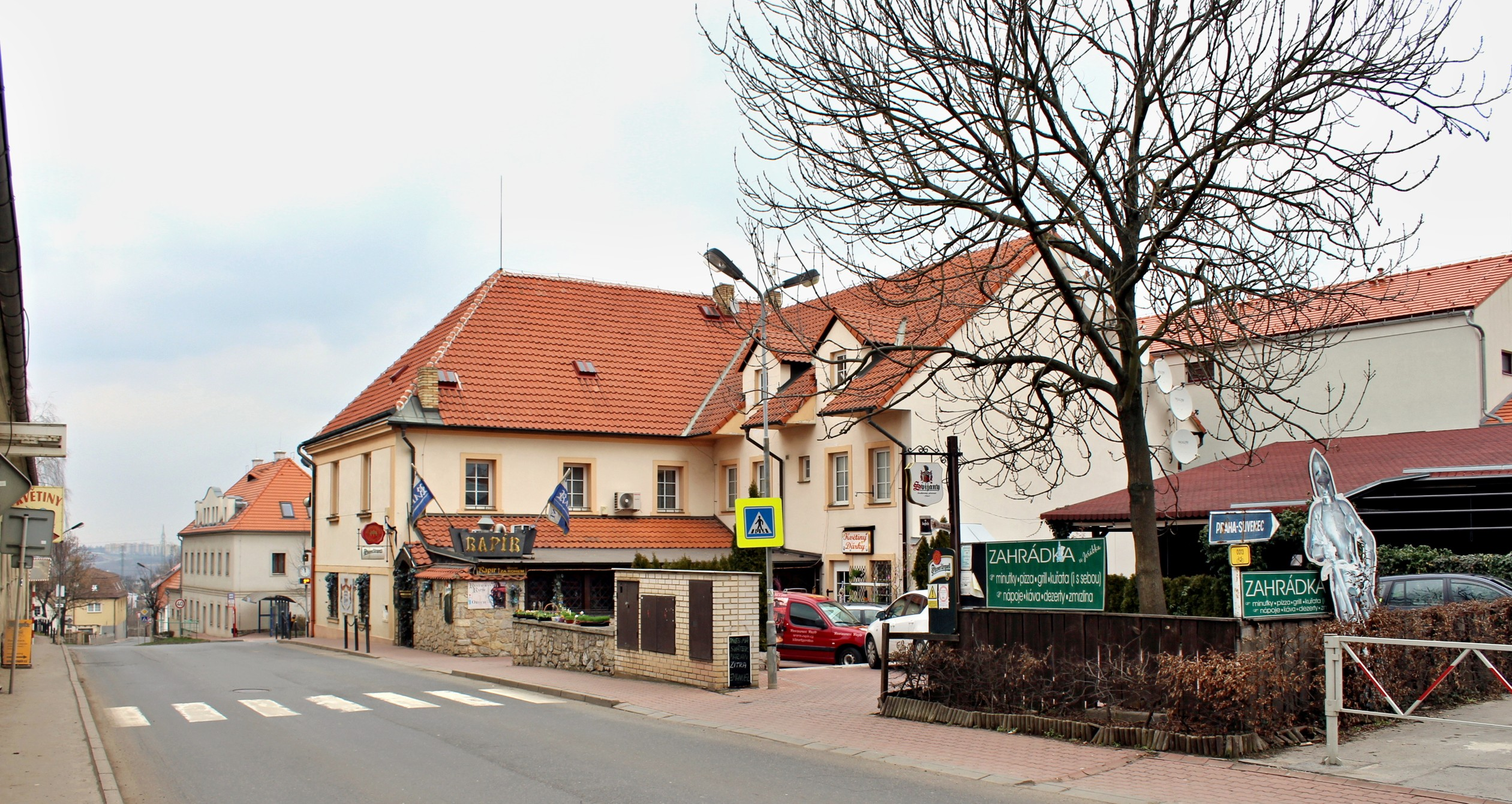 Ořech (Praha-západ)